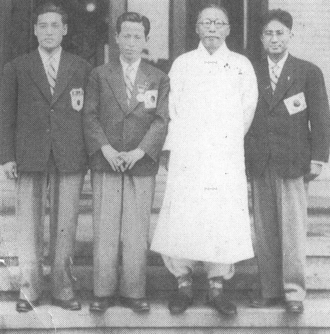 1947년 보스턴 마라톤대회 이후 경교장에서 왼쪽부터 손기정,서윤복,김구,남승룡